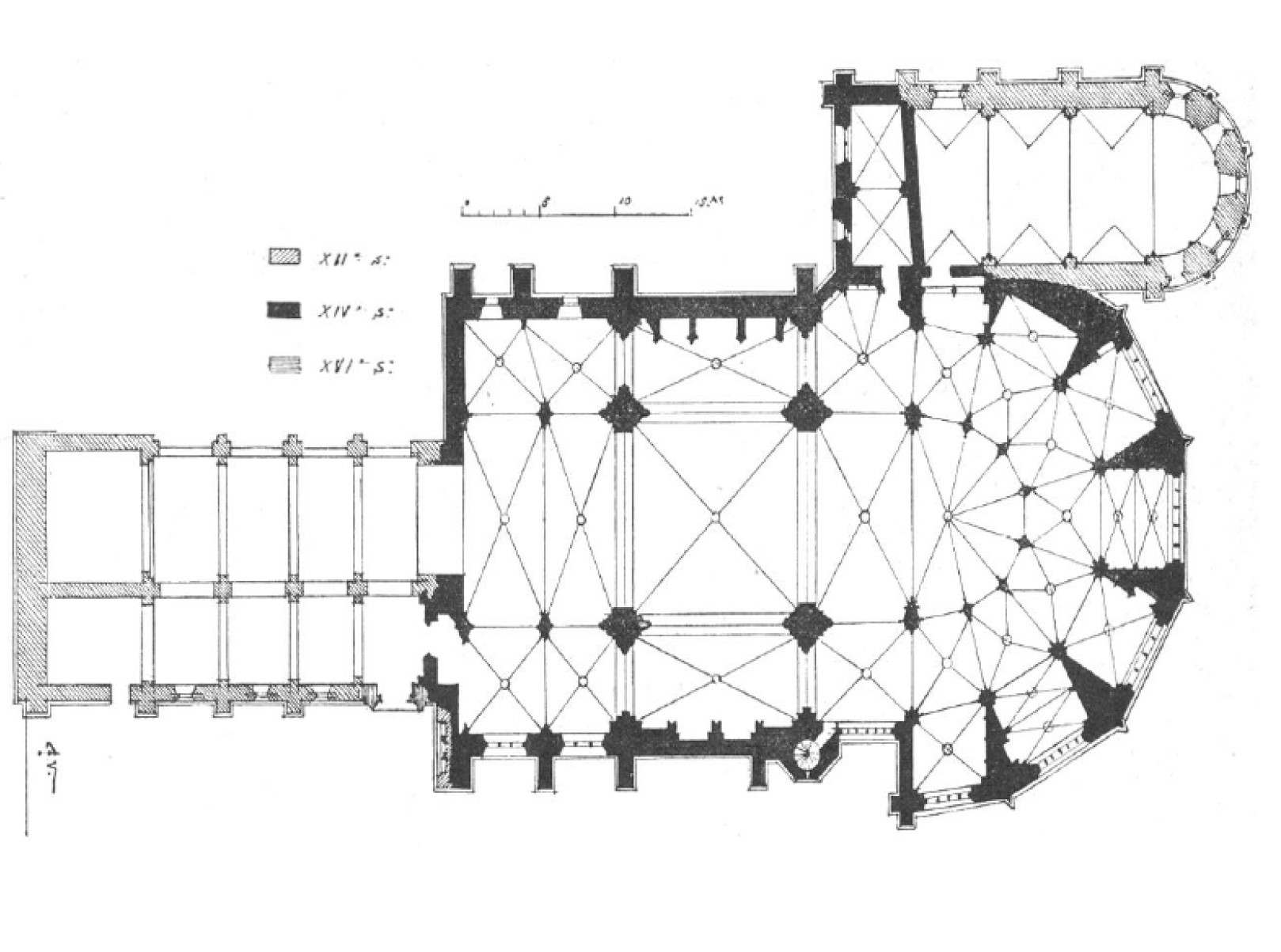 plan de la basilique 1903, depuis les époques de construction ont été réévaluées et la chapelle saint Crépin est en fait inclinée par rapport à l'axe de la basilique